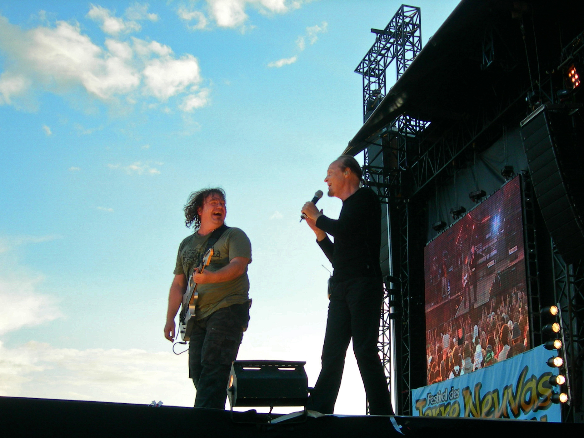 Concert du guitariste Pat O'May pour les 10 ans du festival des Terre-Neuvas à Bobital le 8 juillet 2007 avec son invité Alan Stivell devant 45 000 personnes.